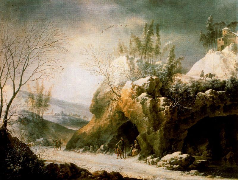 Paisaje invernal en los Apeninos con una cuevatitle QS:P1476,es:"Paisaje invernal en los Apeninos con una cueva" label QS:Les,"Paisaje invernal en los Apeninos con una cueva"